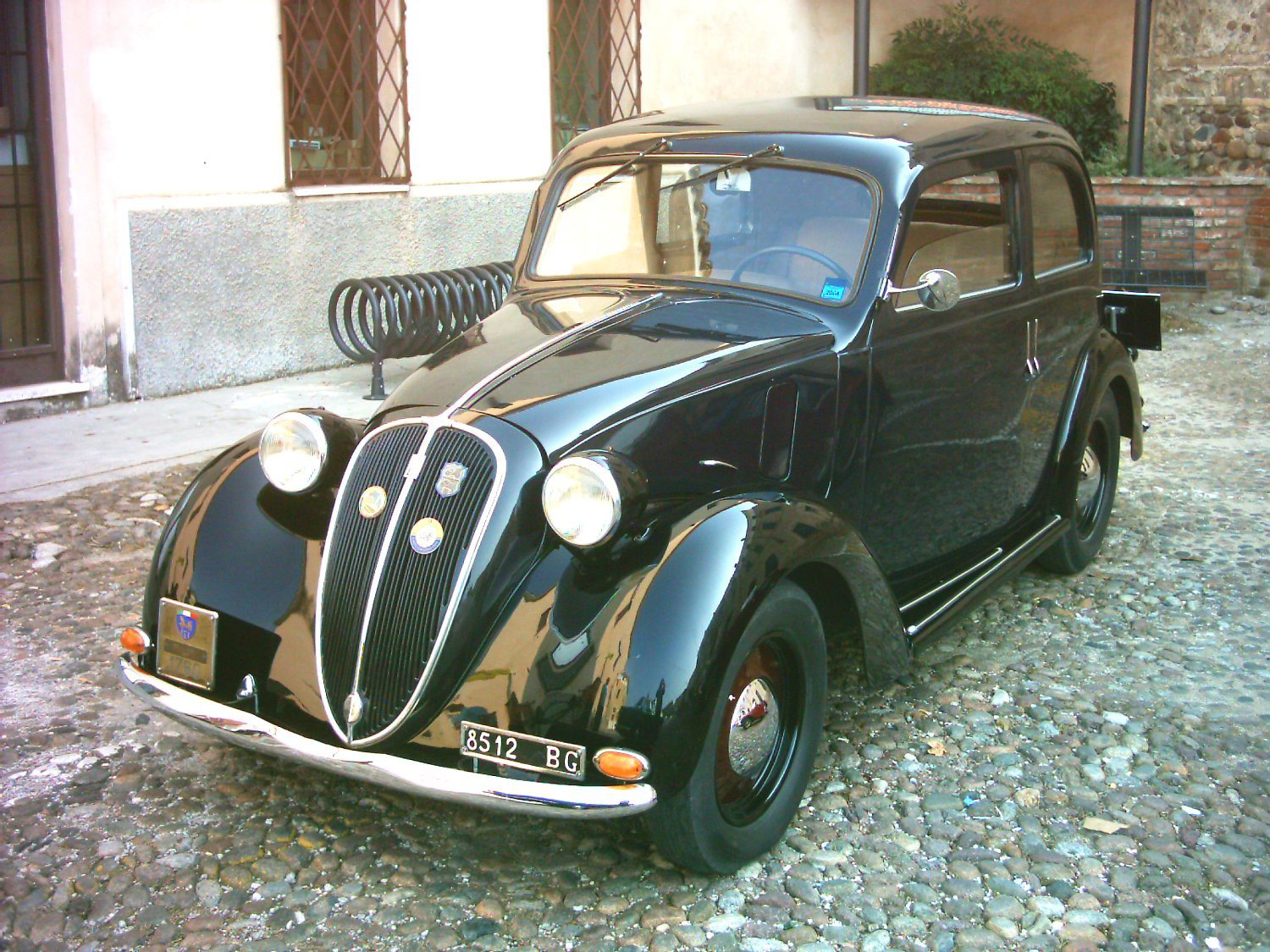 Fiat 508 C del 1936 - Asi targa oro n.1760 fotografato al Raduno Auto Storiche di Medole nel 2007